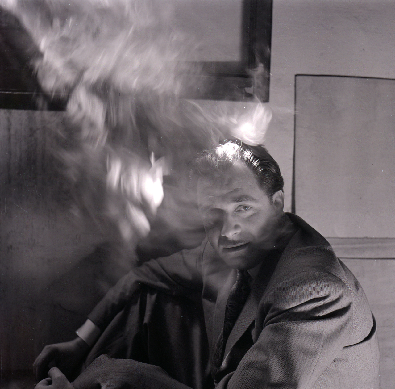 Ritratti di artisti. Nicholson. Servizio fotografico : Brissago, 1960 / Paolo Monti. - Buste: 1, Fototipi: 1 : Negativo b/n, gelatina bromuro d'argento/ pellicola ; 6x6. - ((Sulla busta: "R4446. 1960 Ben Nicholson. Brissago "